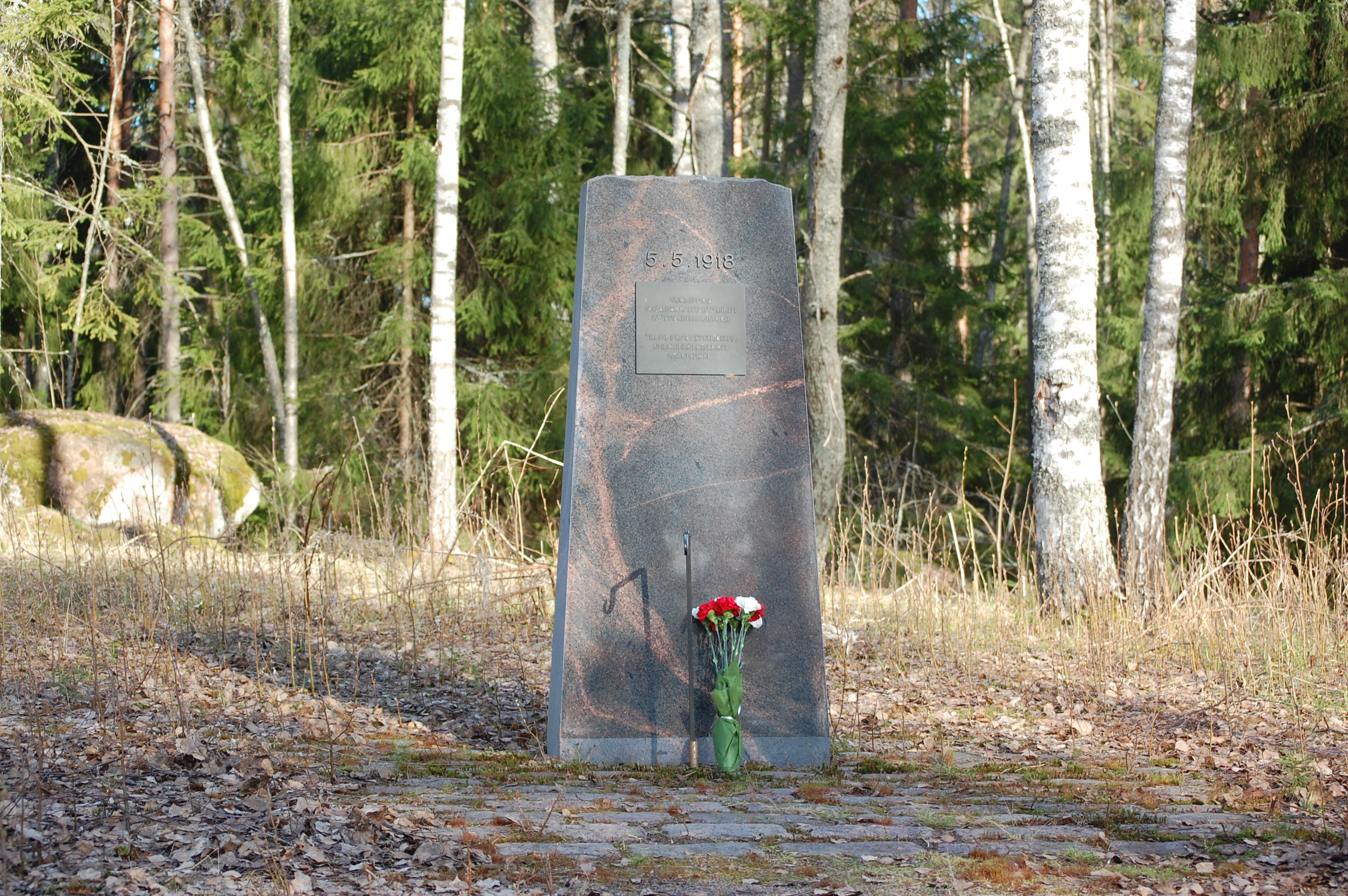 Sisällissodan taisteluiden päättymisen muistomerkki Loviisan Ahvenkoskella paikassa, jossa viimeiset laukaukset ammuttiin.